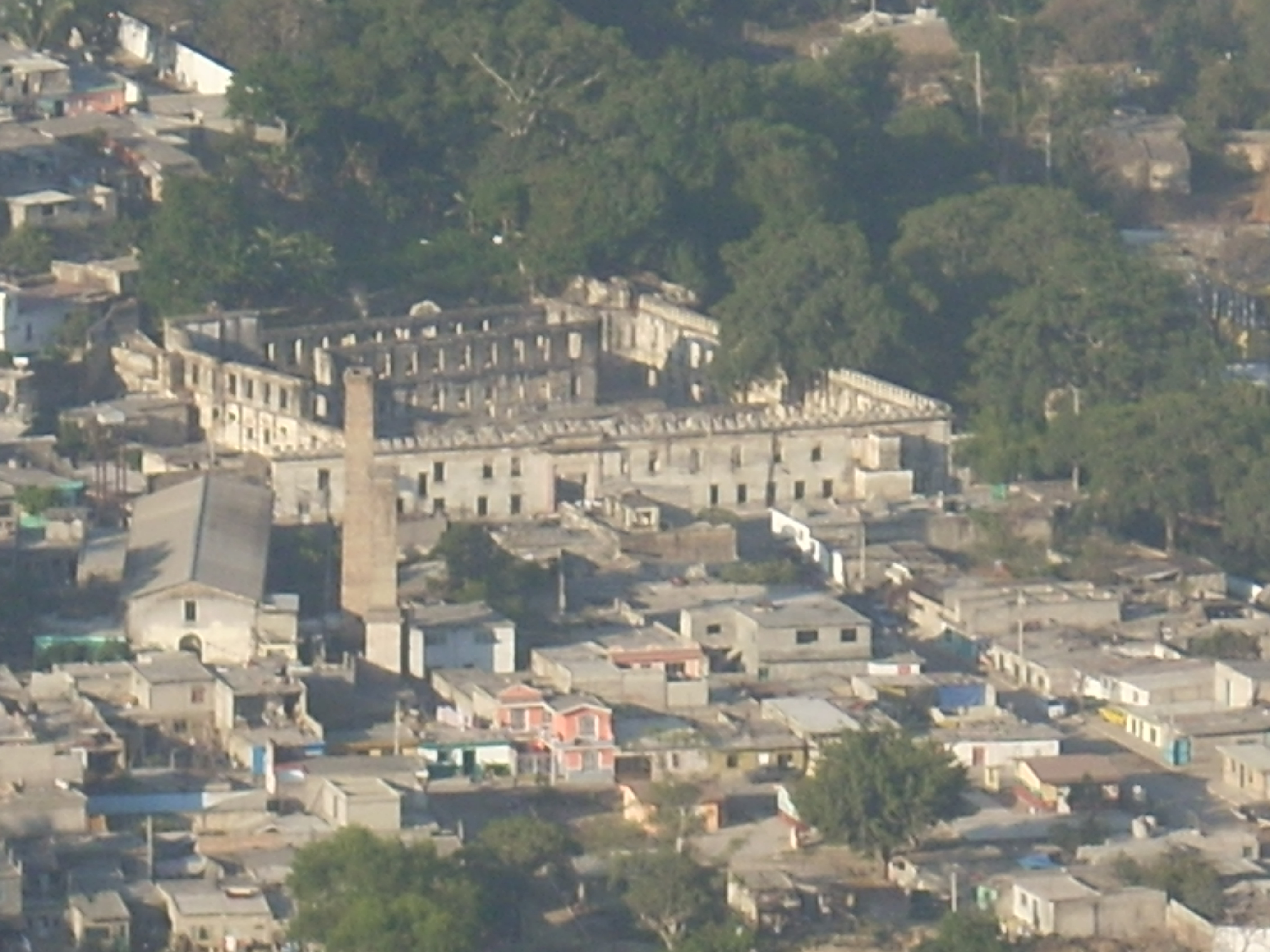 Vista desde el cerro de la Cruz de las ruinas de Jauja en Tepic, Nayarit